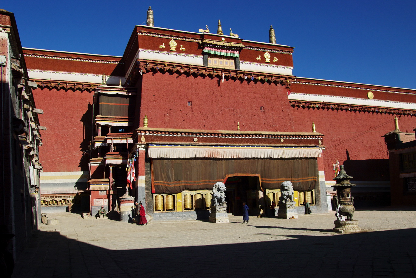 Versammlungshalle des Südklosters Sakya